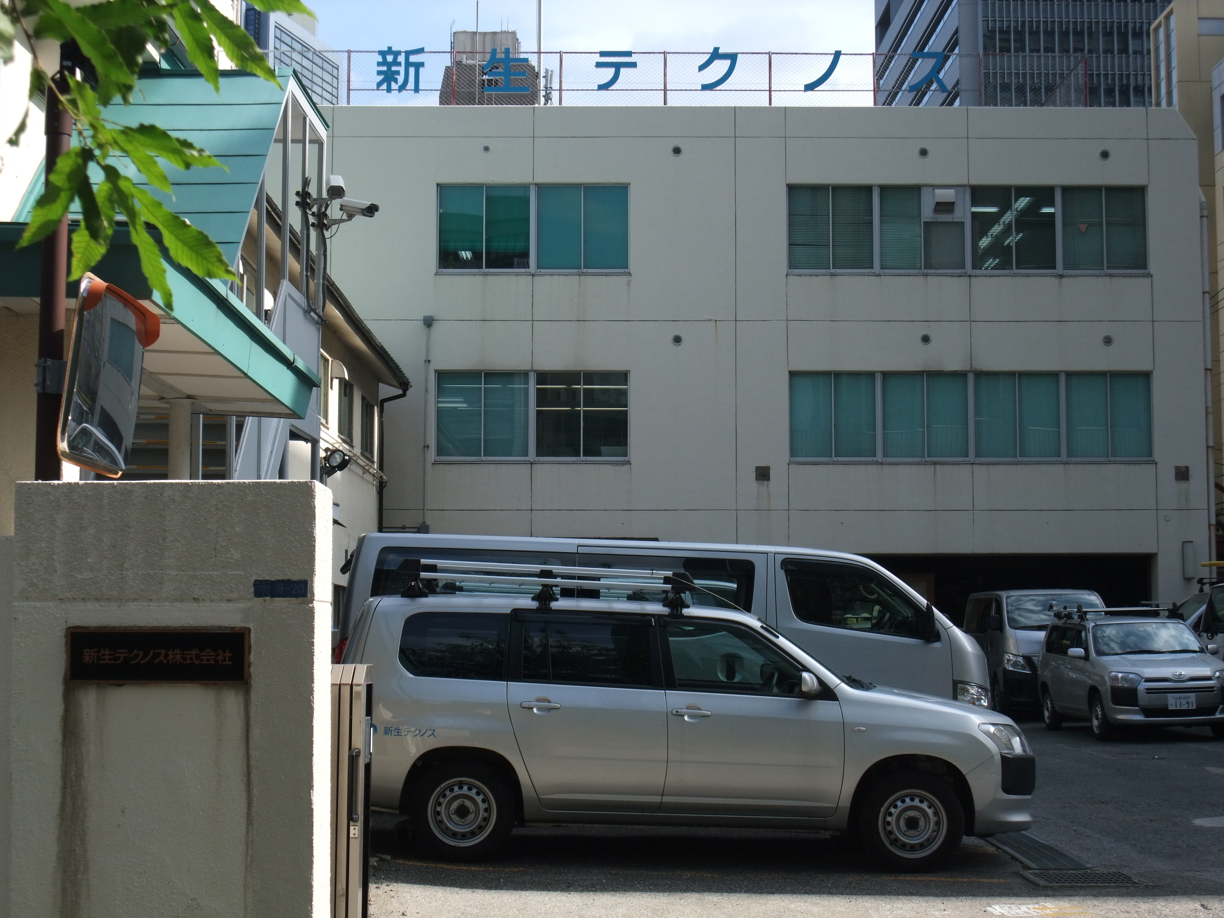 JR東海グループの新生テクノス中央支店